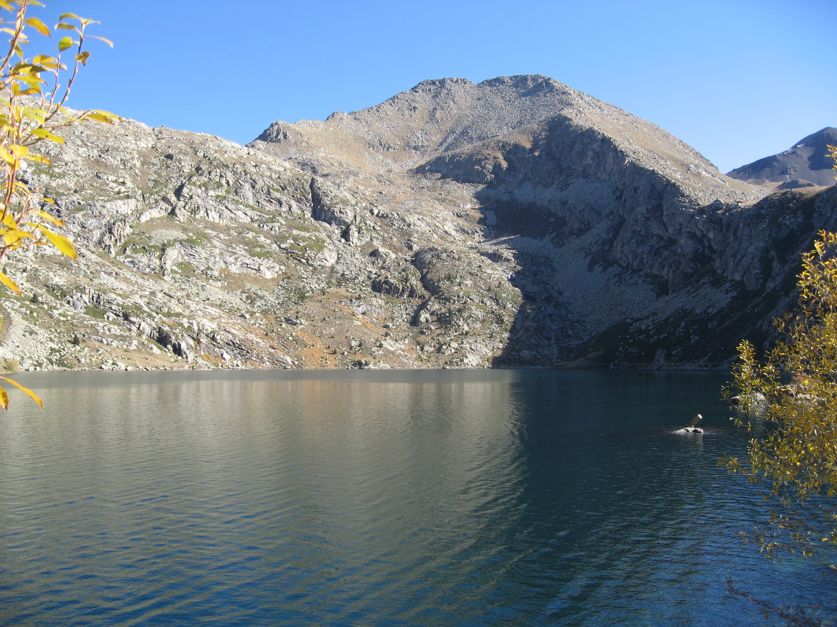 Estany Gento i, al fons, la Pala Pedregosa de Llessui, a la capçalera del riu Flamicell, a la Vall Fosca (Pallars Jussà - Catalunya)